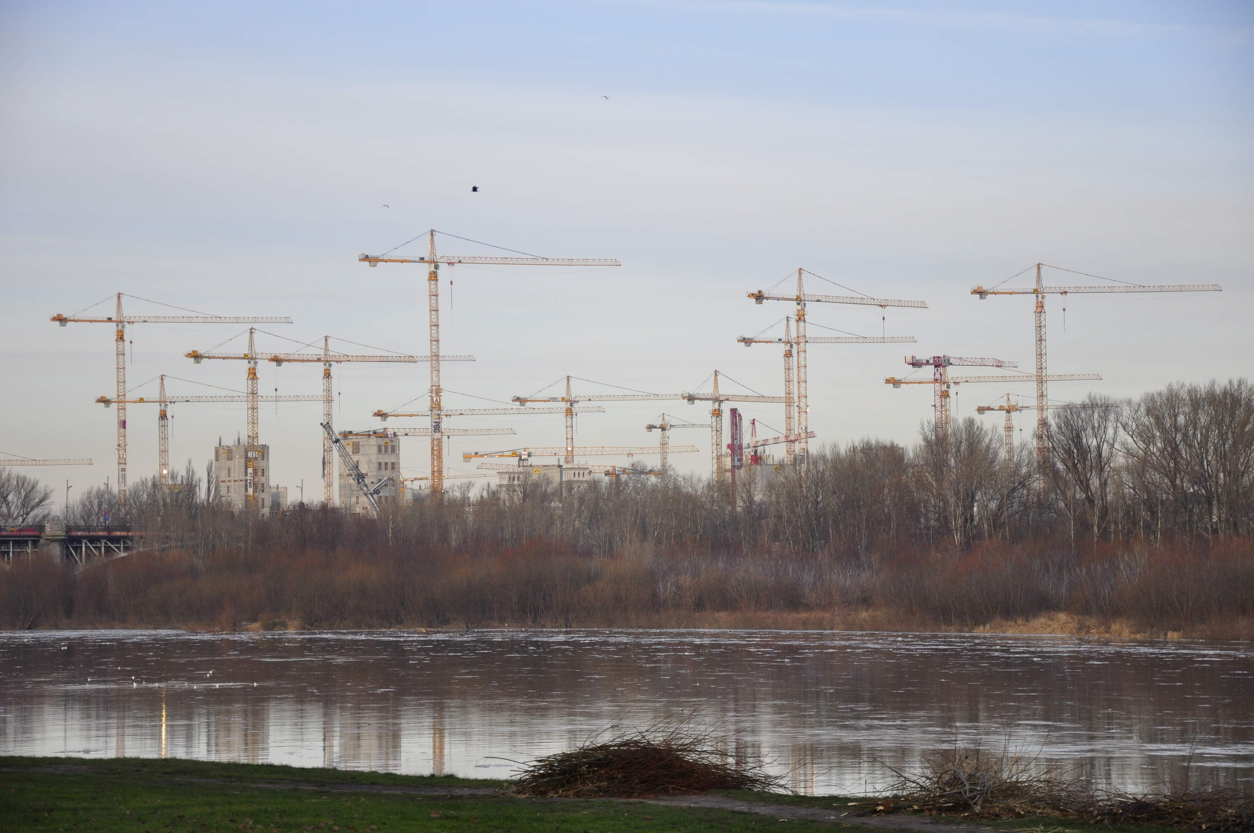 Warschau, Neubau Stadion